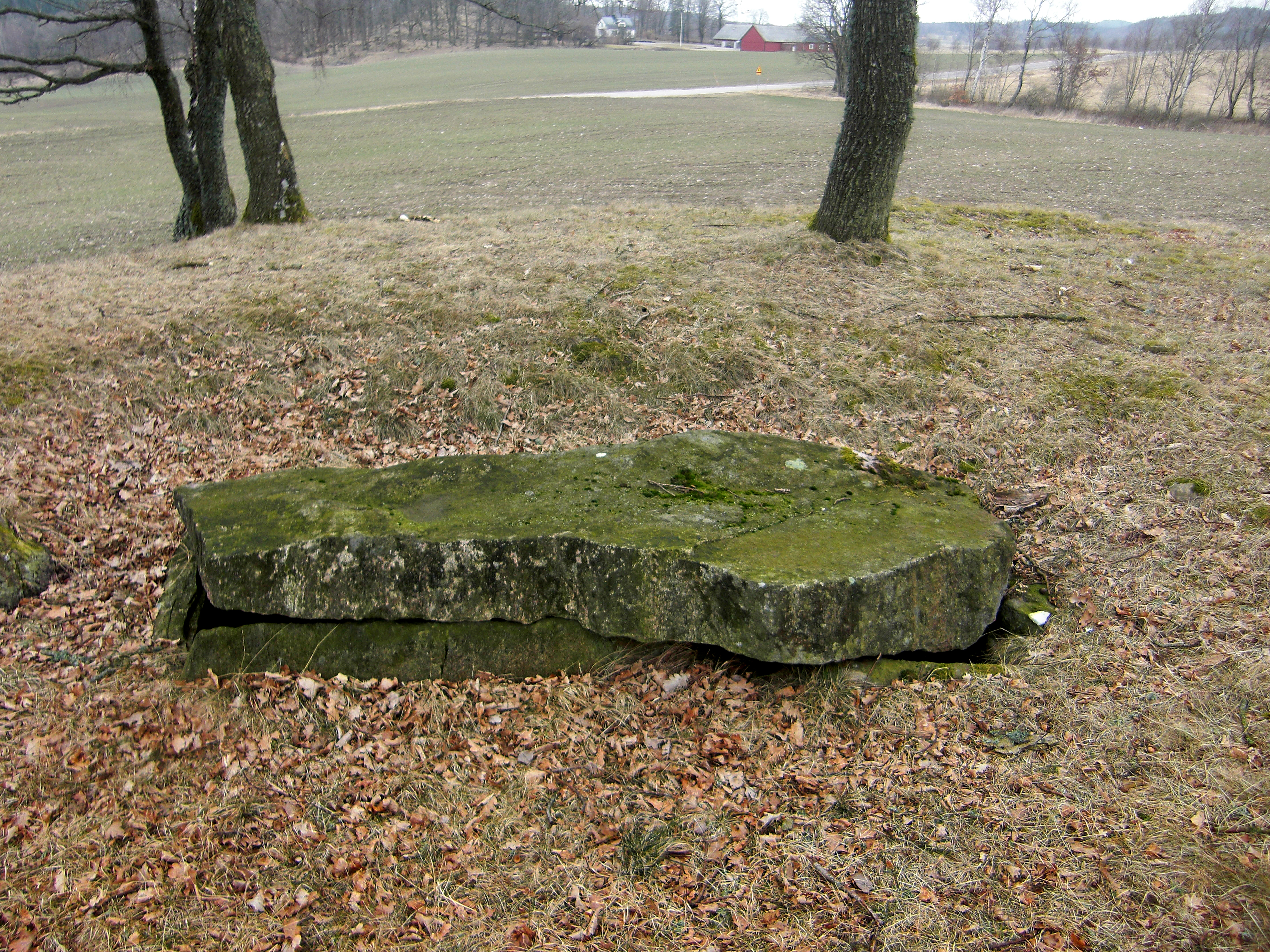 Den senneolitiska hällkistan i Bostället (RAÄ-nr Asige 19:1) i Asige socken, Årstads härad, Falkenbergs kommun, Halland, Hallands län, Sverige.